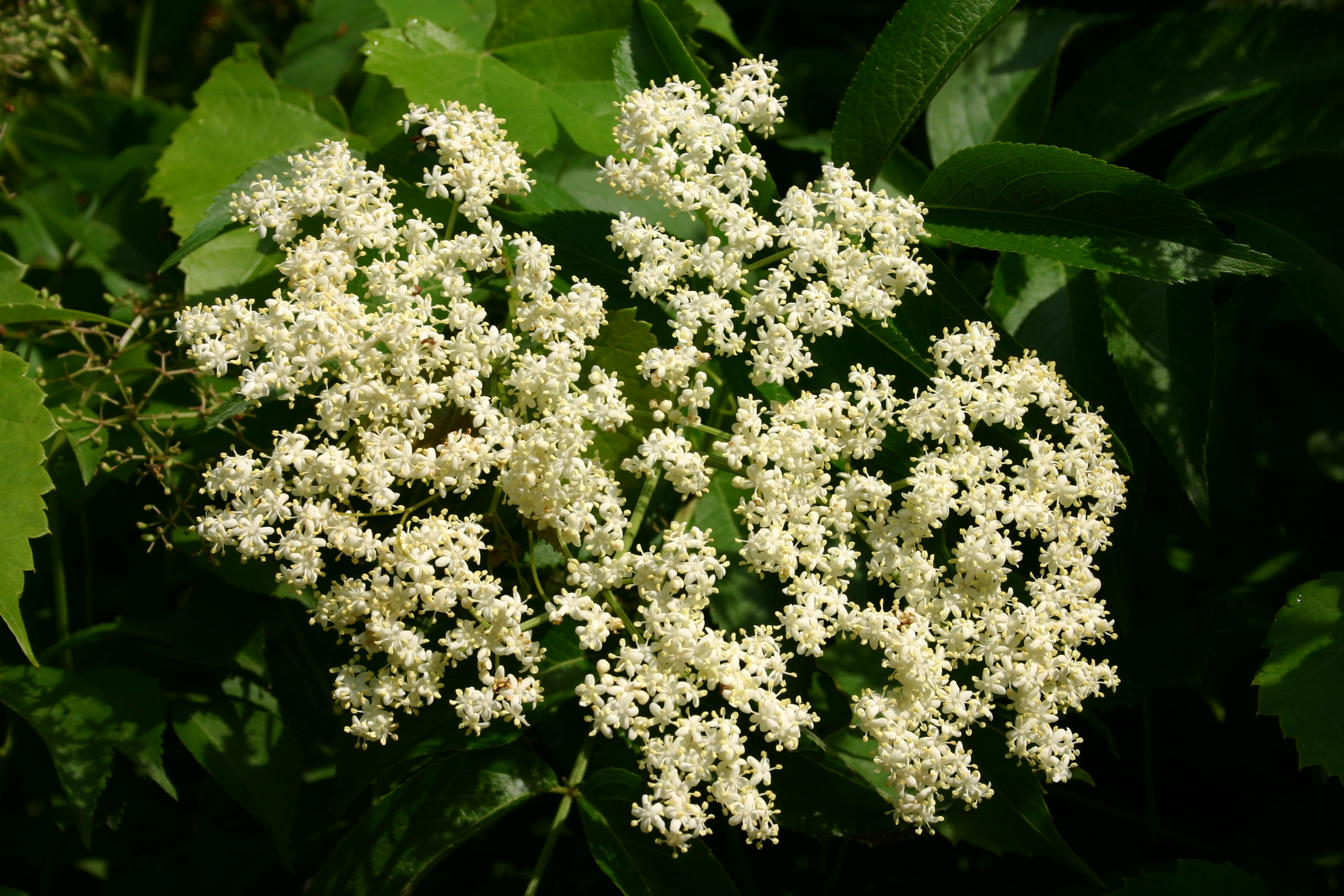 Sambucus canadensis inflorescence